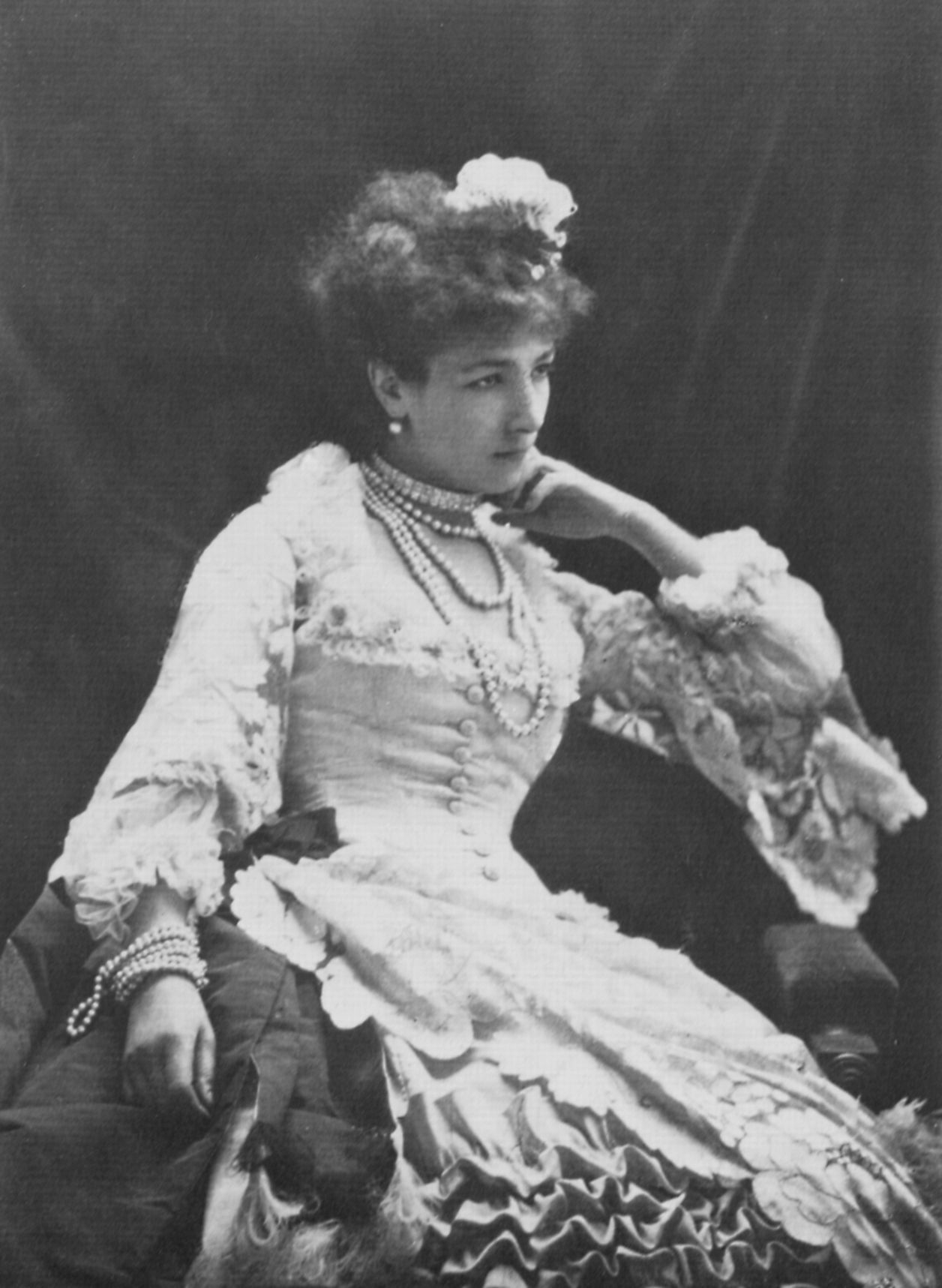 Atelier Nadar: Porträt Sarah Bernhardt [1]